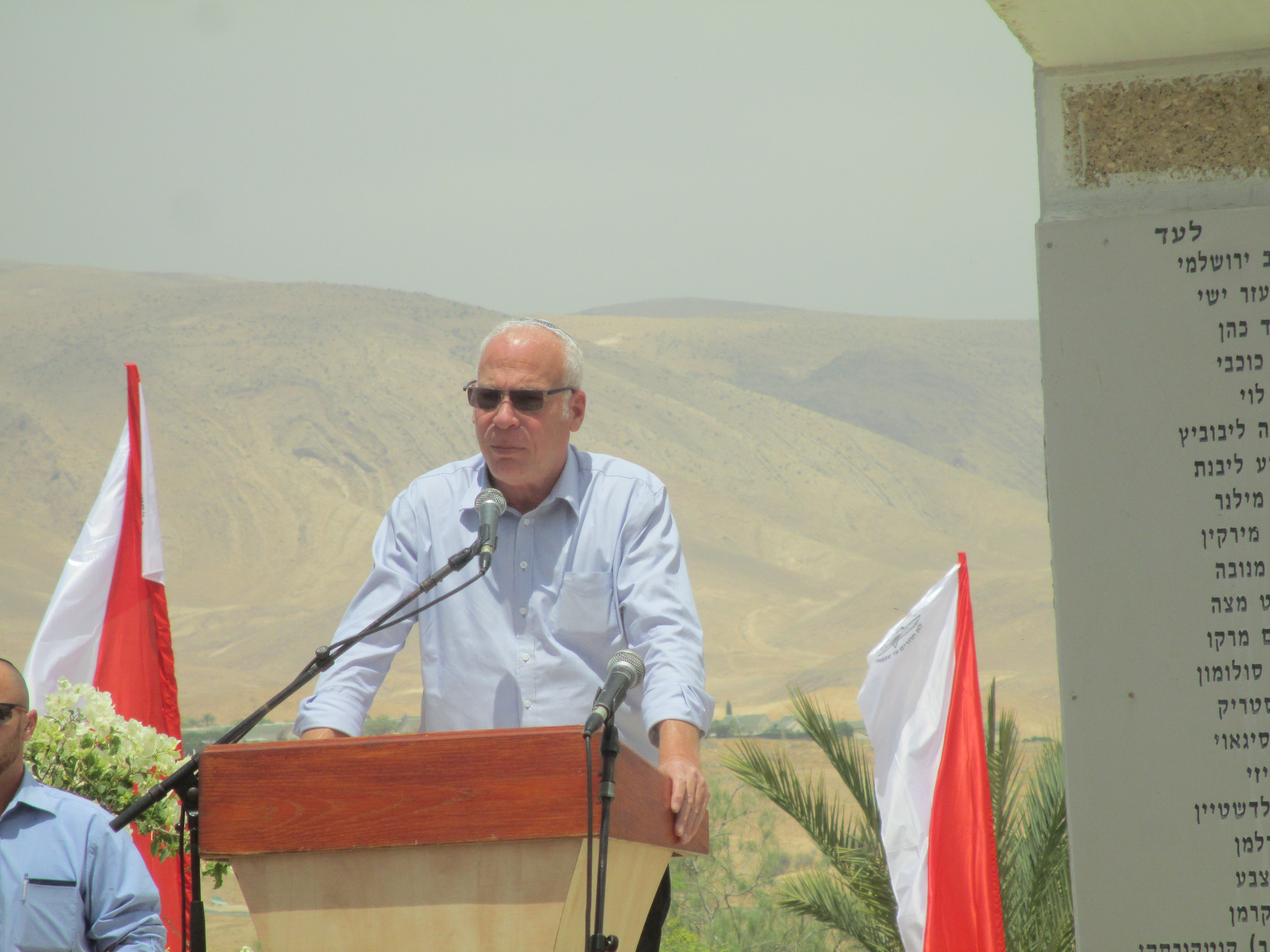 השר אורי אריאל בטכס אזכרה לאסון הנ"ד. אנדרטת הנ"ד בבקעה ליד מושב ייטב.